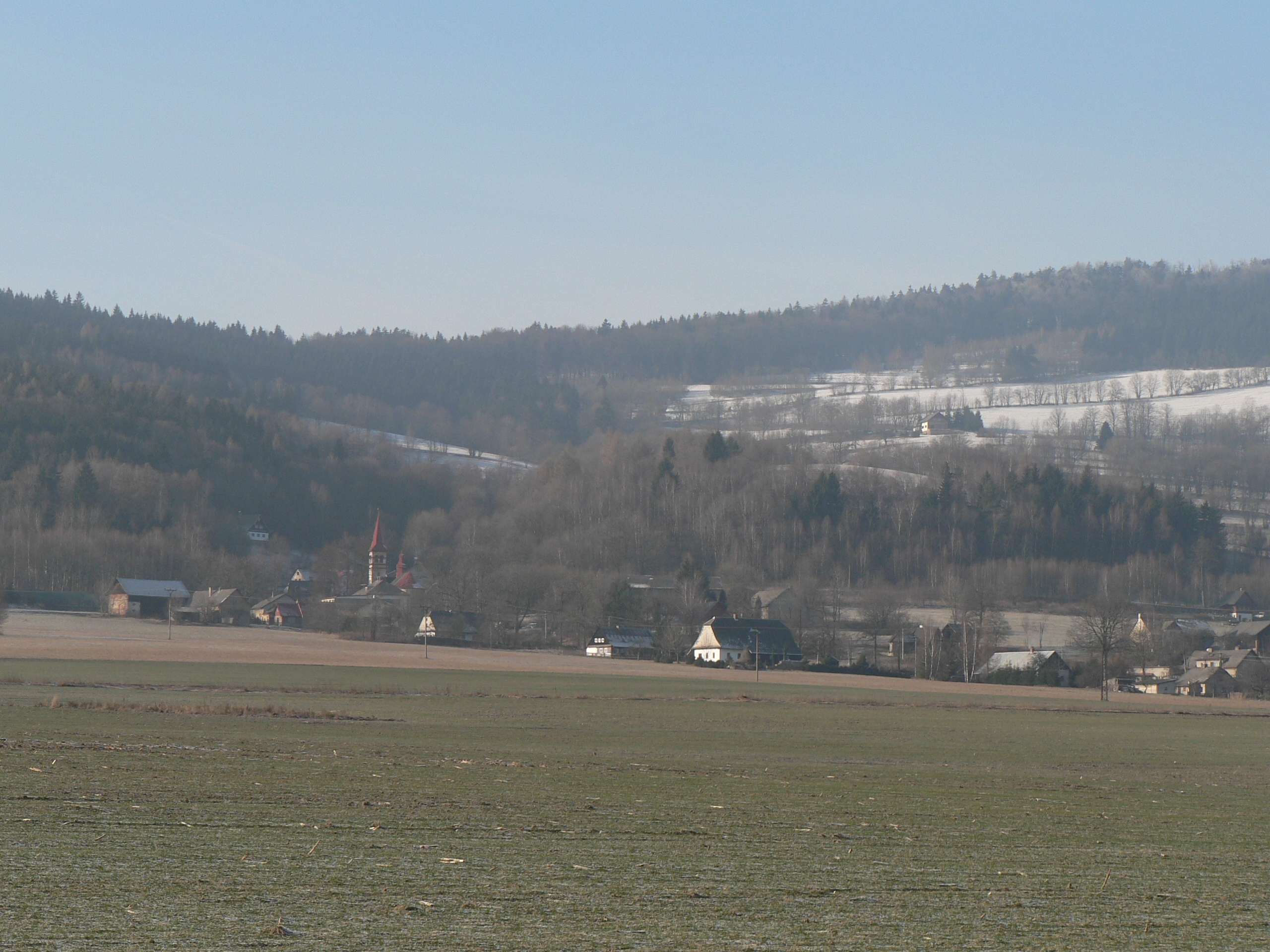 Pohled na Heroltice ze silnice na Štíty